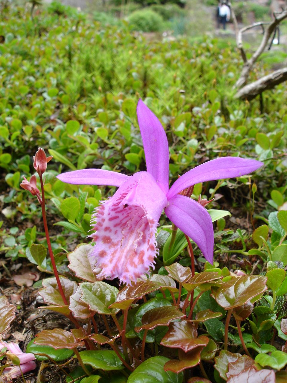 Pleione limprichtii